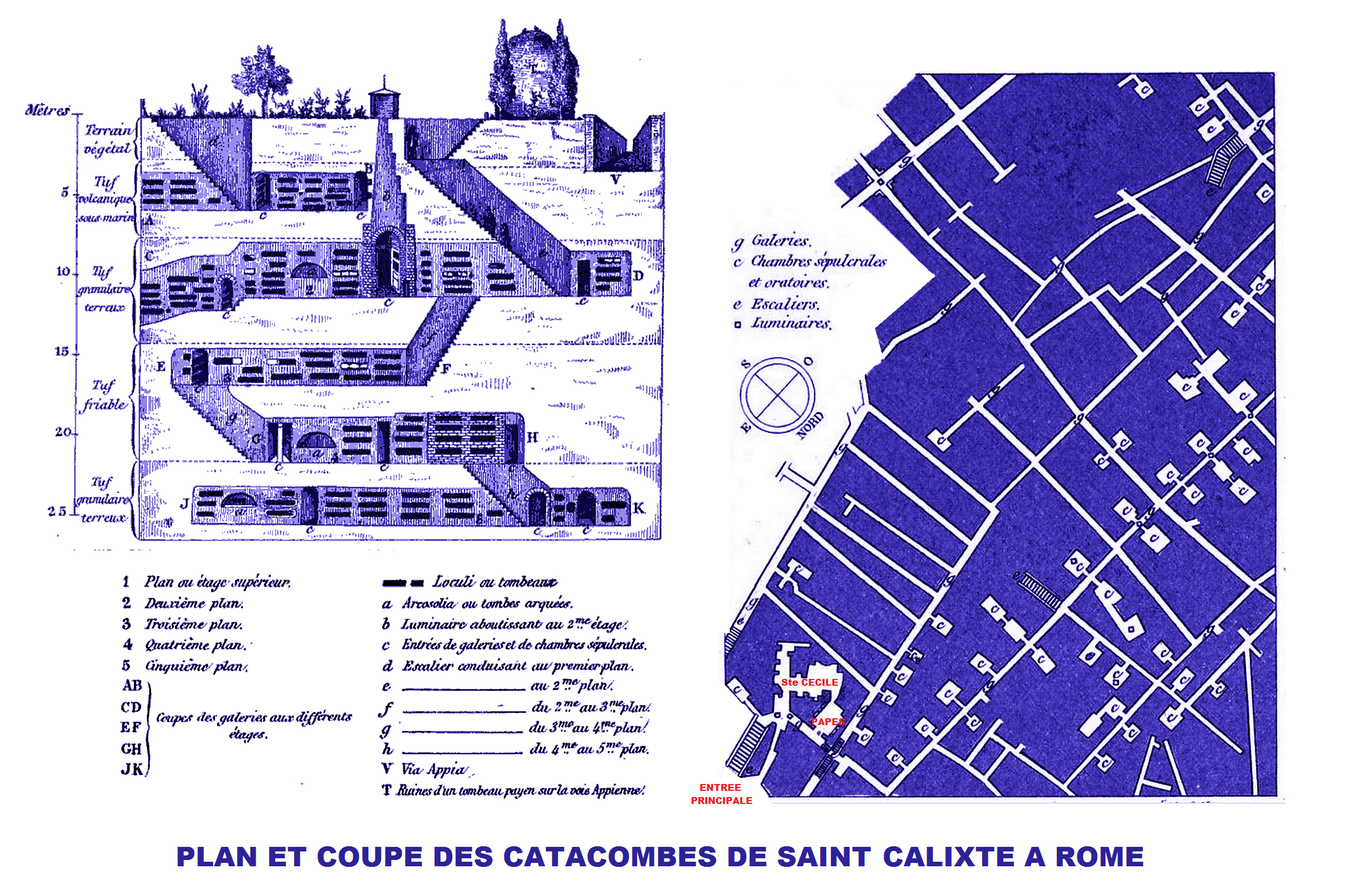 Plan et coupe des catacombes de saint Calixte à Rome (image du domaine public modifiée)